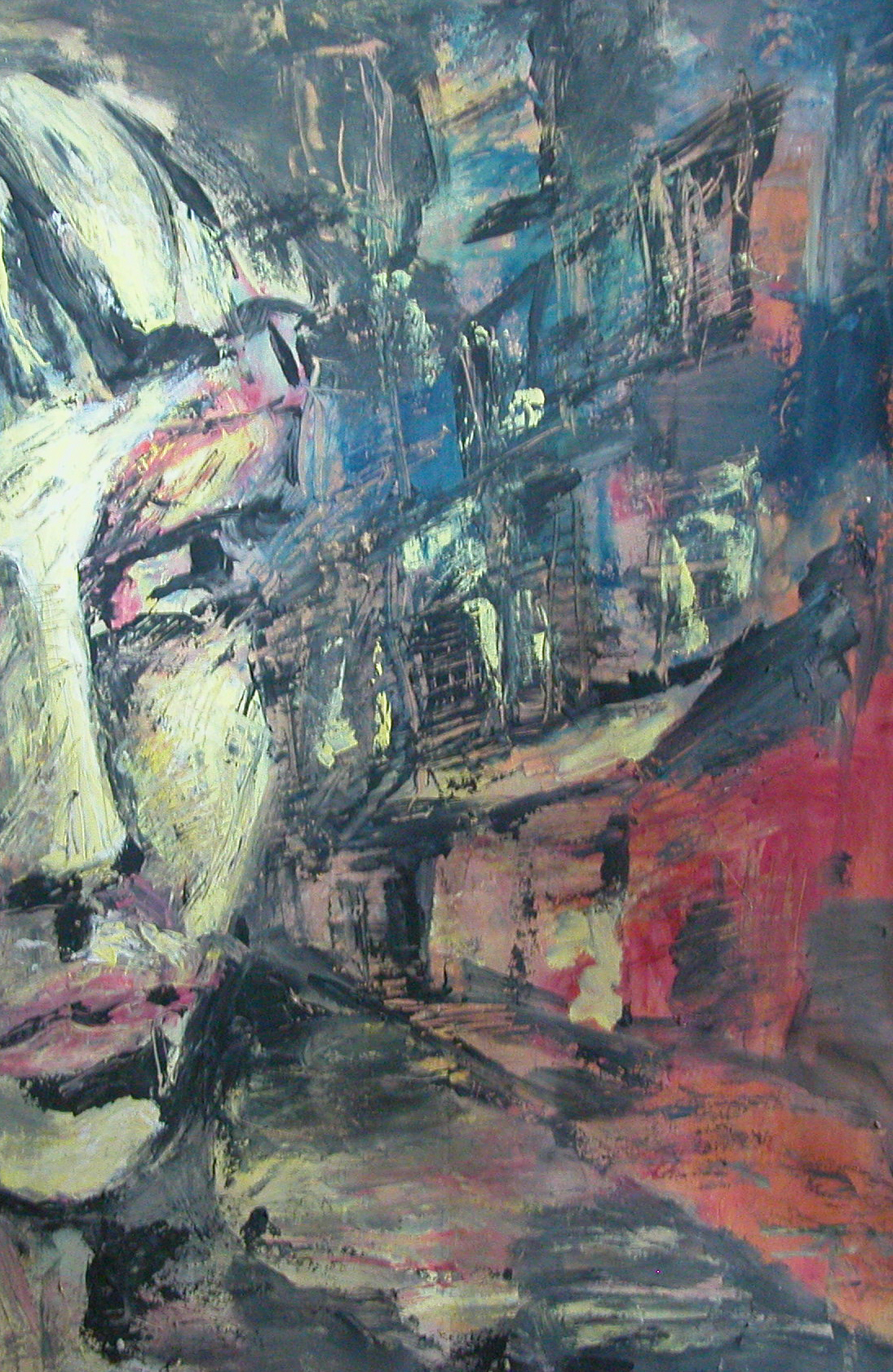 die Schwägerin, um 1955